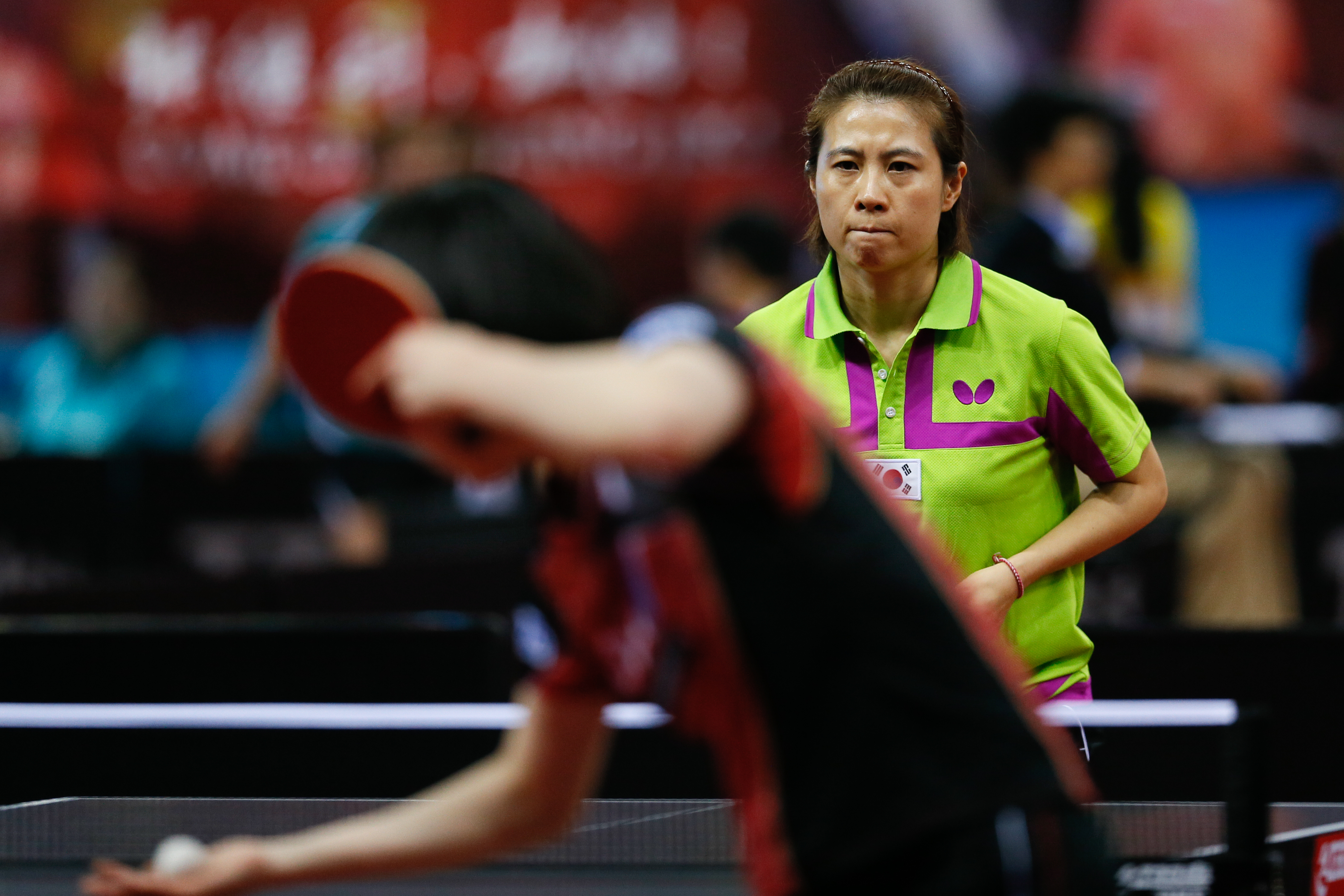 _K0K3122